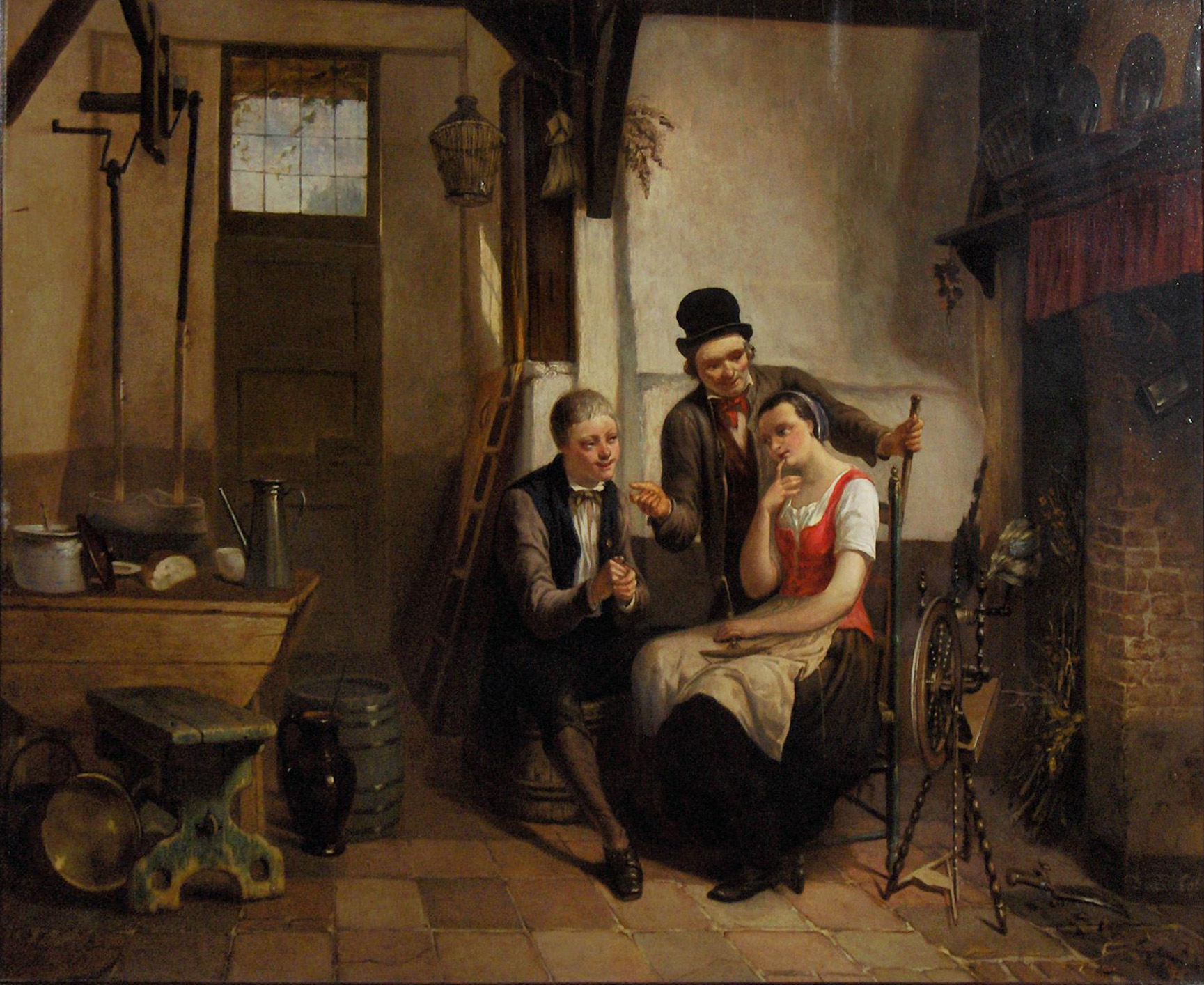 "Interieur met personages" (1857), olieverf op paneel door Jan David Col (1822-1900) en Constant Boon (1830-1882)